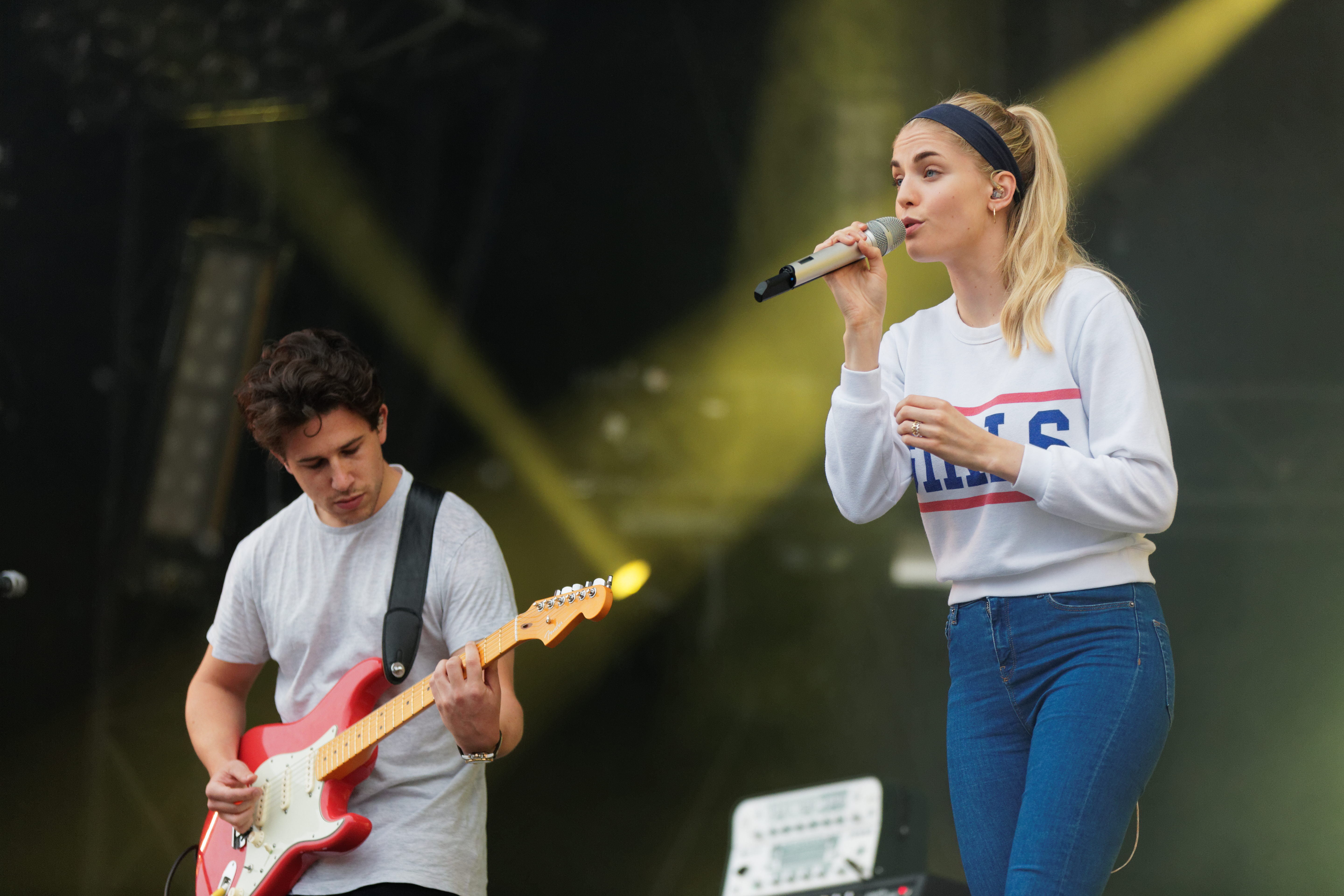 Le festival des vieilles charrues 2015.